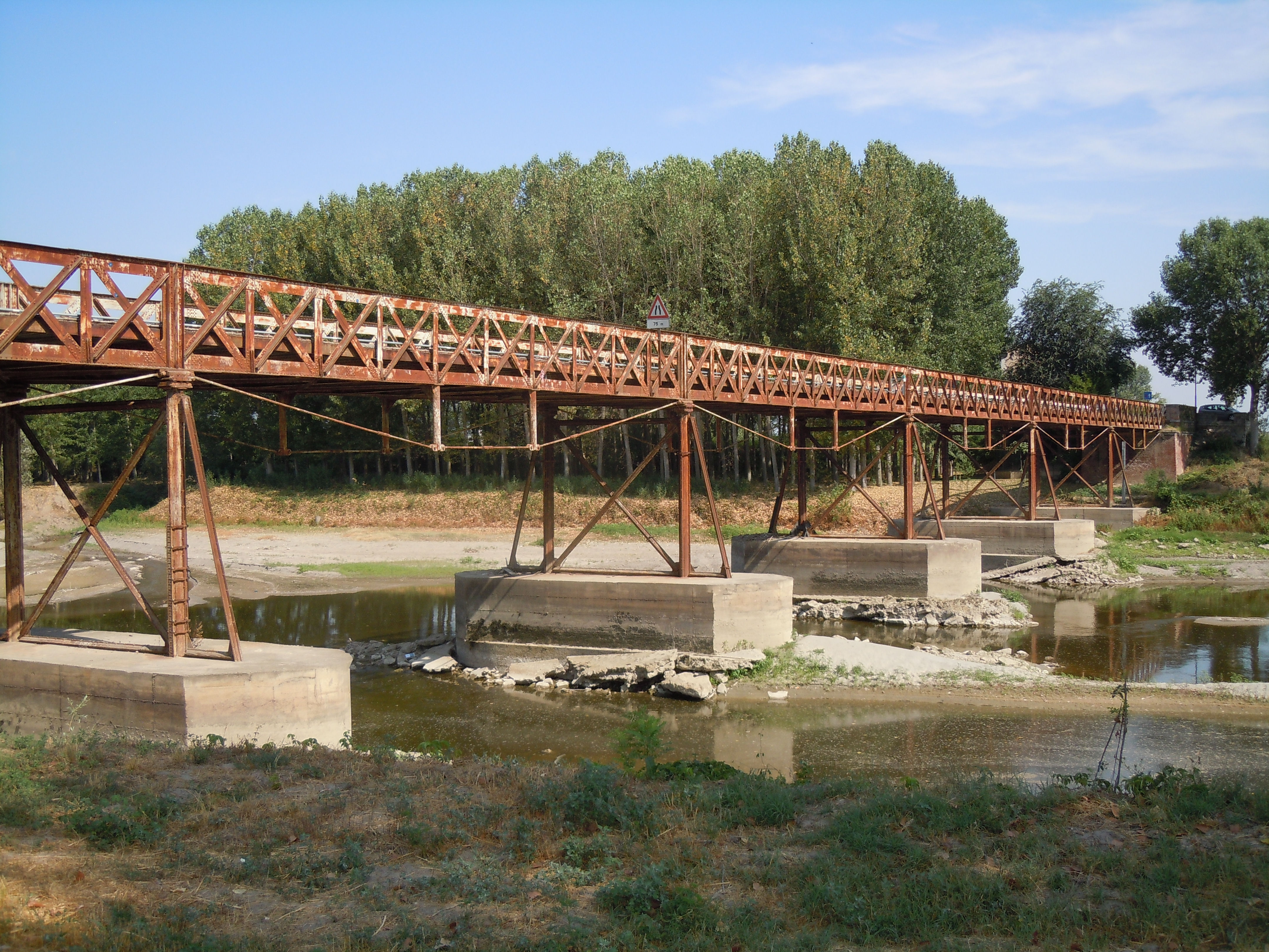 Acquanegra sul Chiese, ponte sull'Oglio.